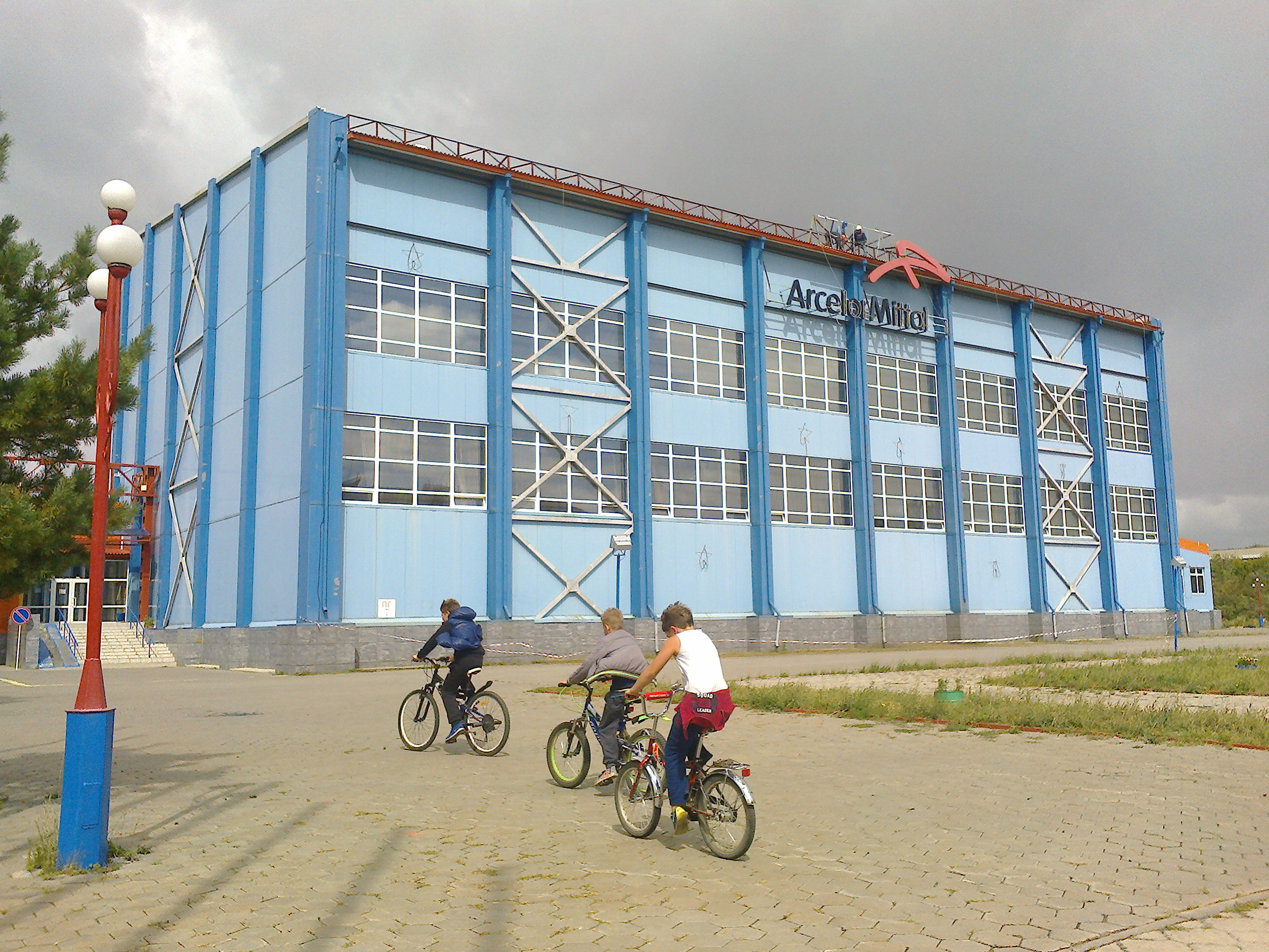 Спорткомплекс Миттал в Темиртау